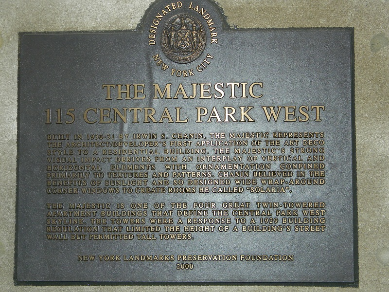 The Majestic 115 Central Park West New York